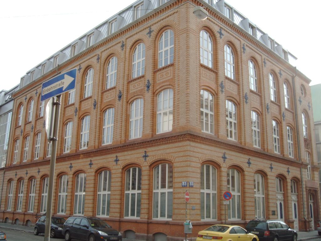 Institut für Deutsche Sprache in Mannheim